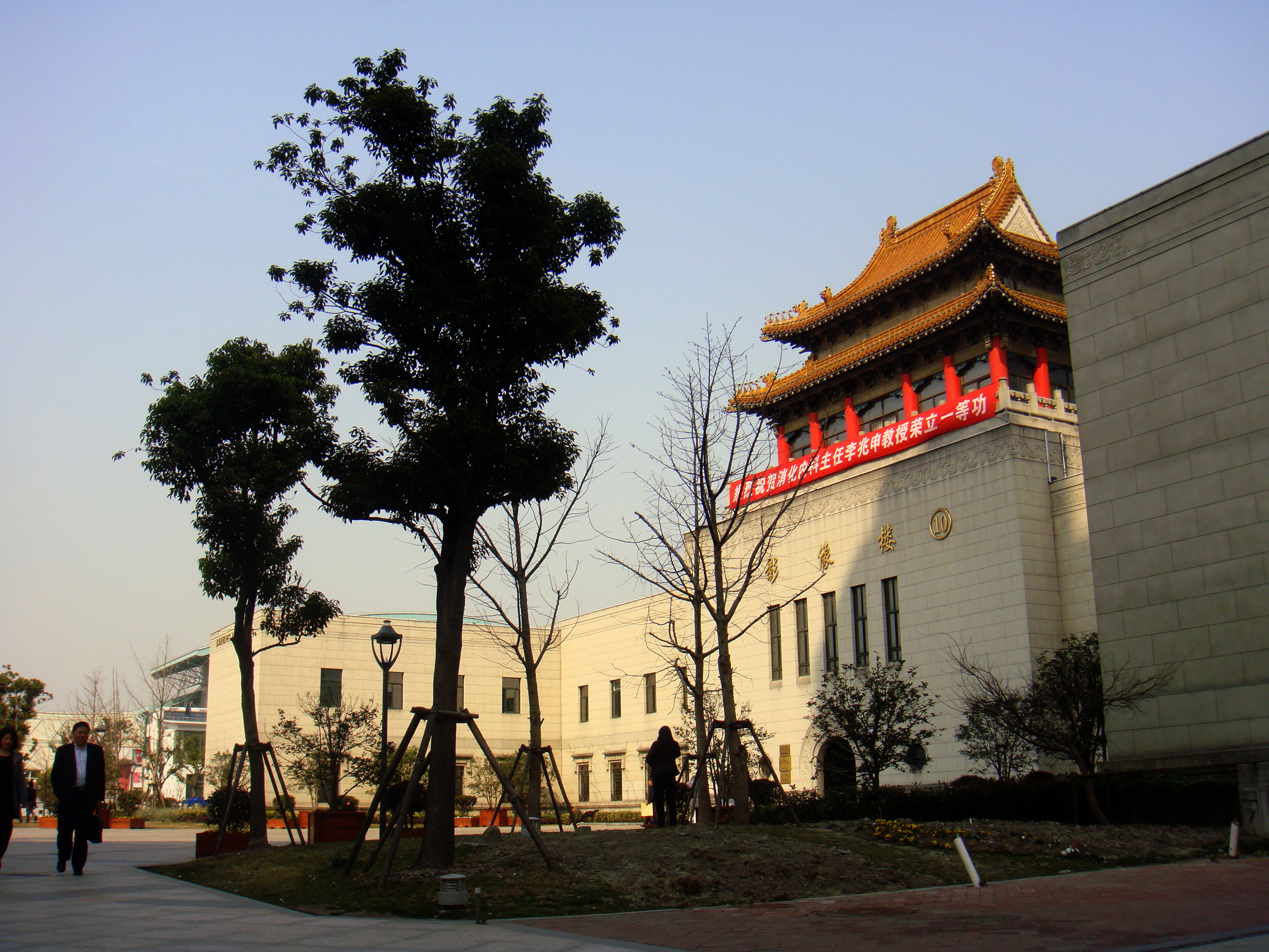 中文（中国大陆）: 上海市立博物馆原楼现状，位于上海长海医院内